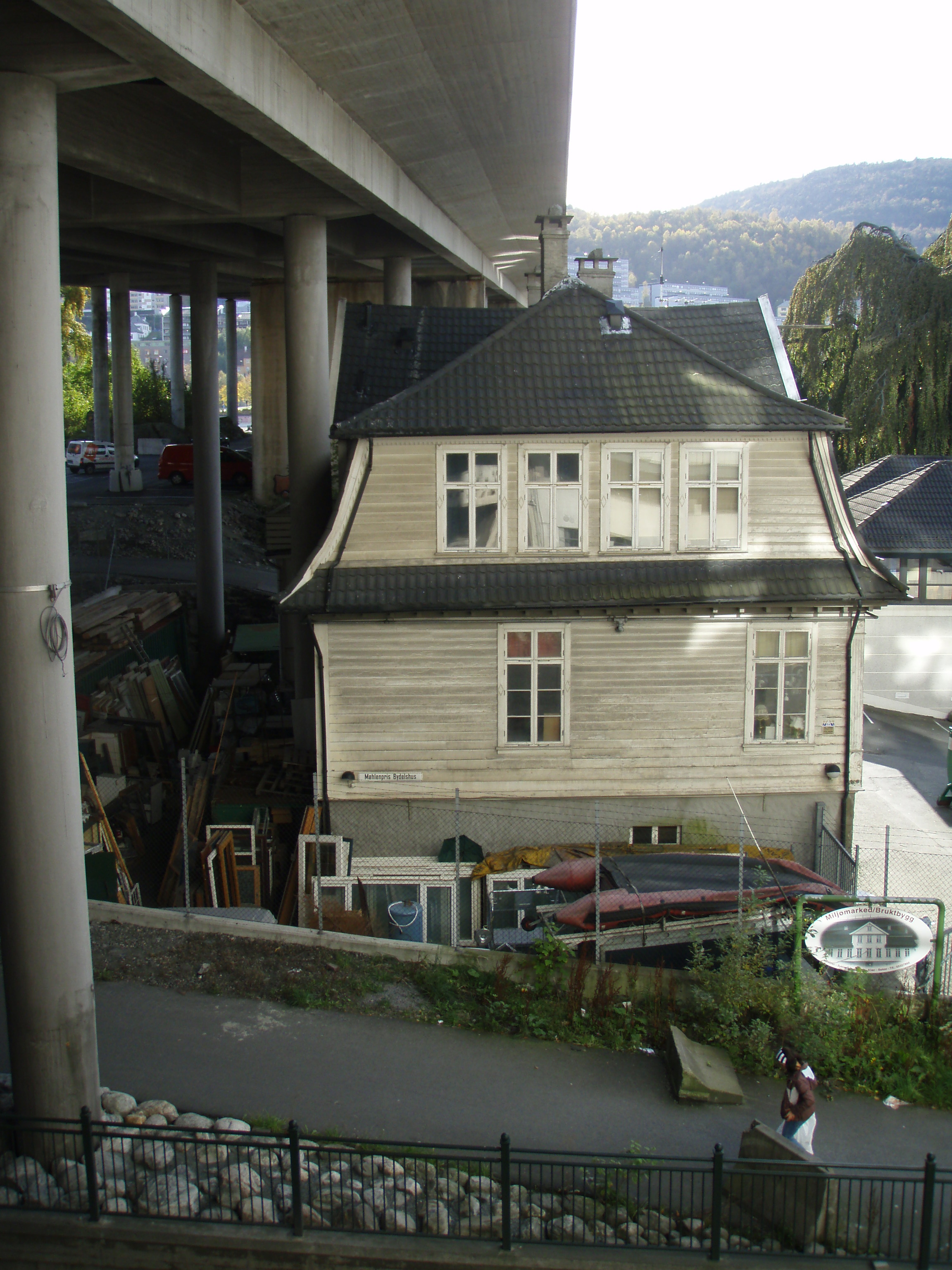 House under Puddefjordsbroen, Bergen